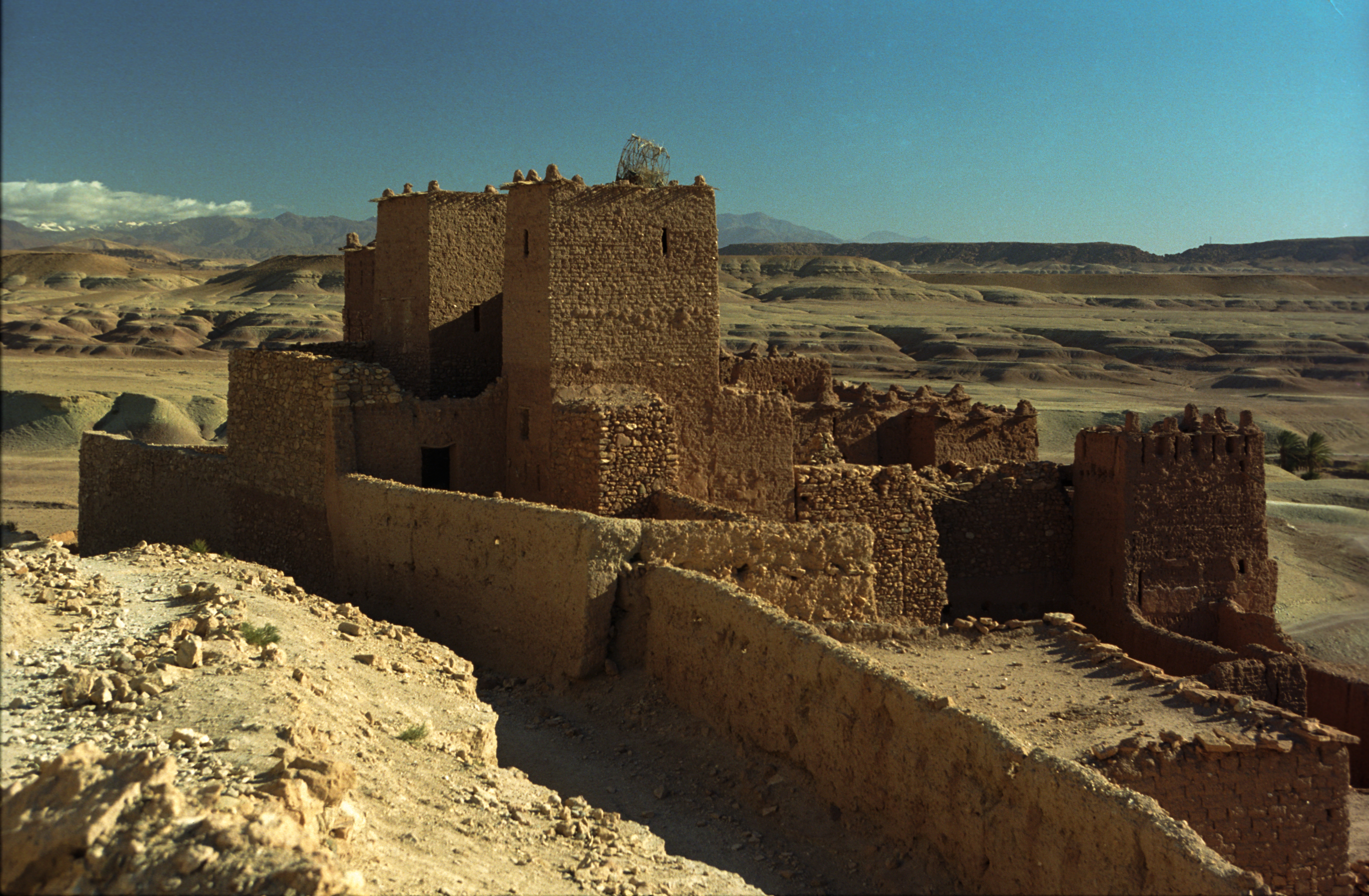 Aït Benhaddou